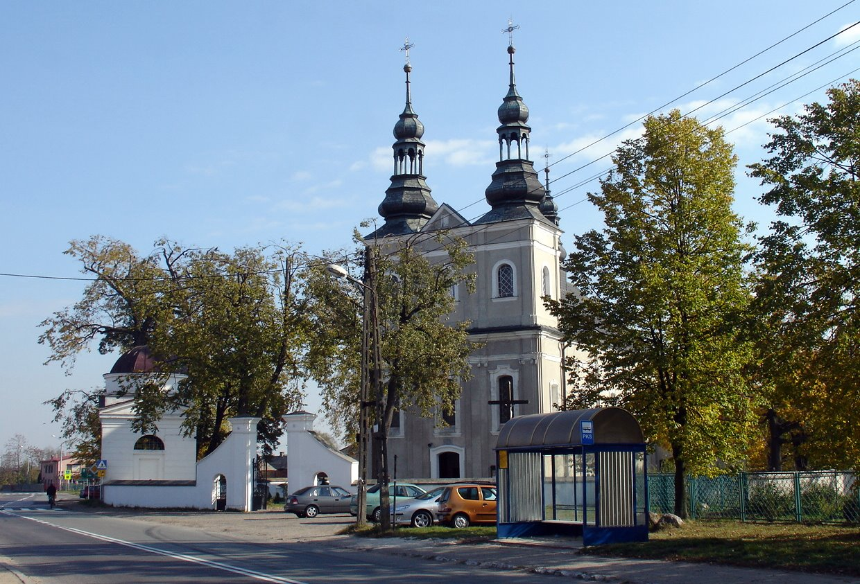 Kościół w Kłomnicach (widok od strony zachodniej).